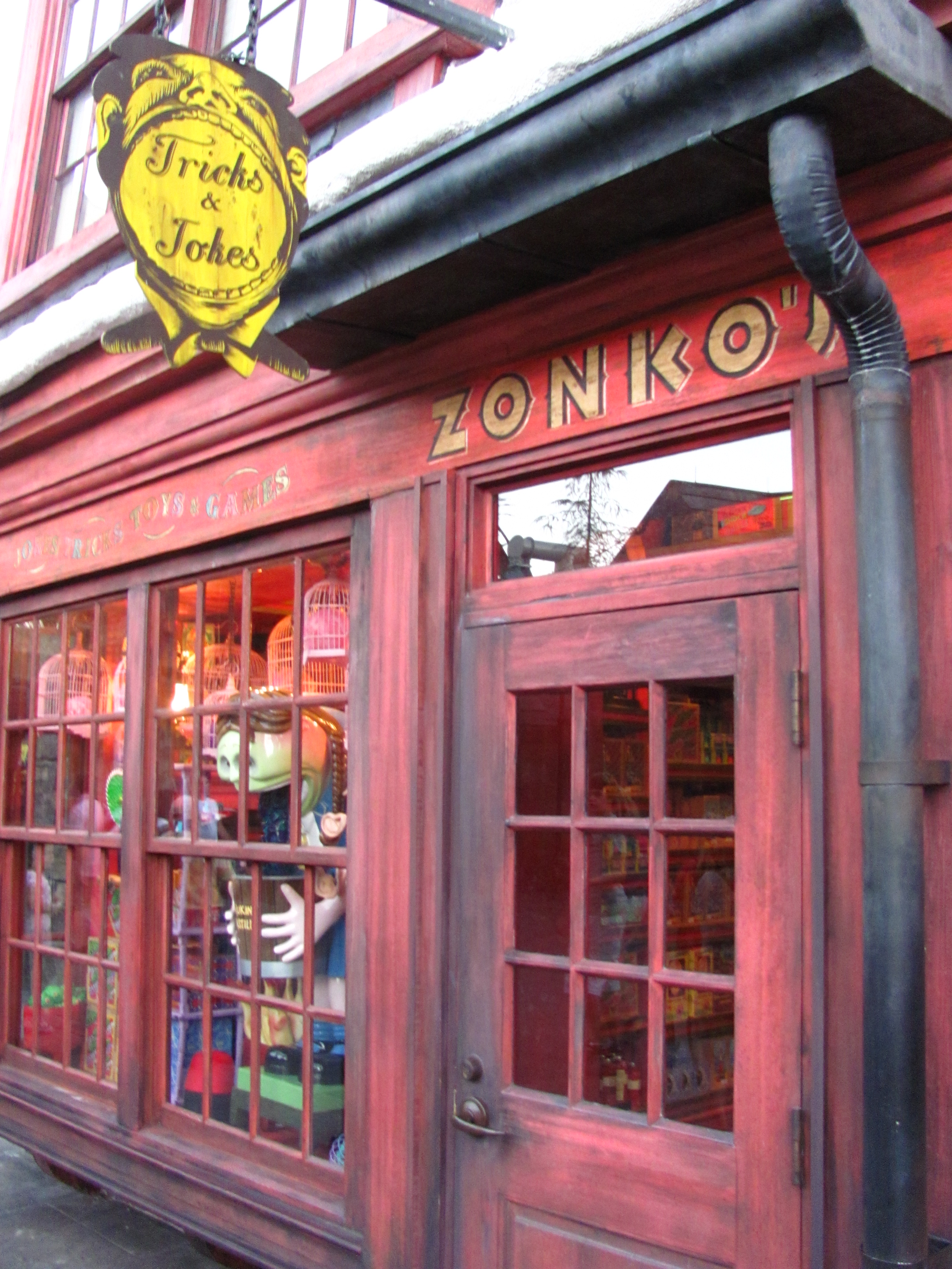 Zonko's